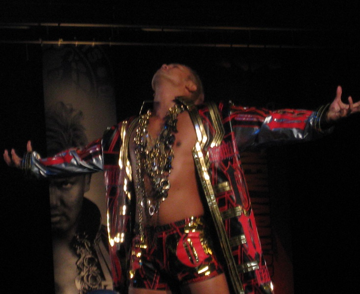 レインメーカーポーズを決めるオカダ・カズチカ（新日本プロレス、大阪大会2月12日）